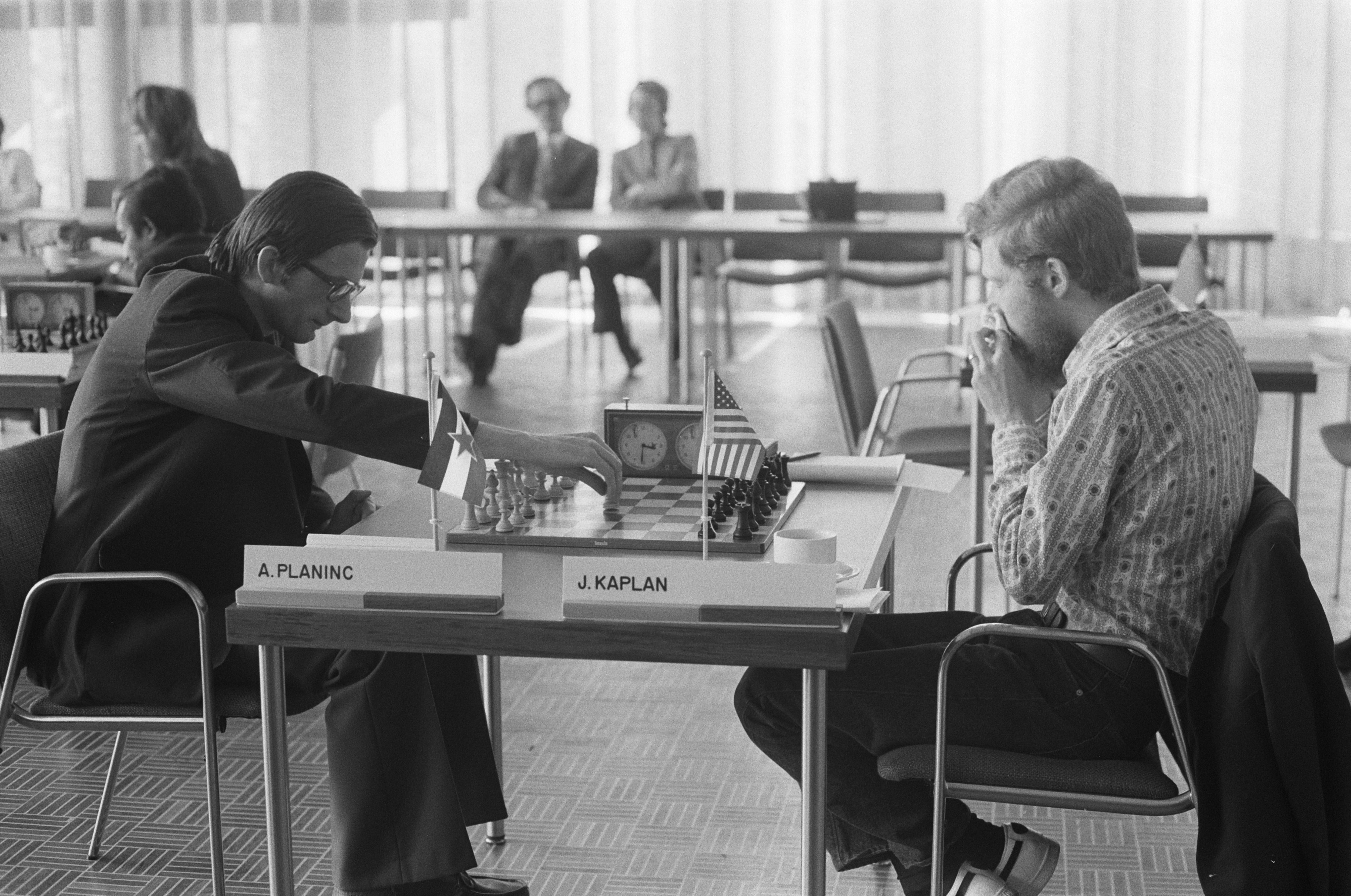 Collectie / Archief : Fotocollectie Anefo Reportage / Serie : [ onbekend ] Beschrijving : IBM-schaaktoernooi 3e ronde, Planinc tegen Kaplan (rechts) Datum : 18 juli 1974 Trefwoorden : schaken Persoonsnaam : Kaplan, J., Planinc, A. Instellingsnaam : IBM-Schaaktoernooi Fotograaf : Croes, Rob C. / Anefo, [onbekend] Auteursrechthebbende : Nationaal Archief Materiaalsoort : Negatief (zwart/wit) Nummer archiefinventaris : bekijk toegang 2.24.01.05 Bestanddeelnummer : 927-3355